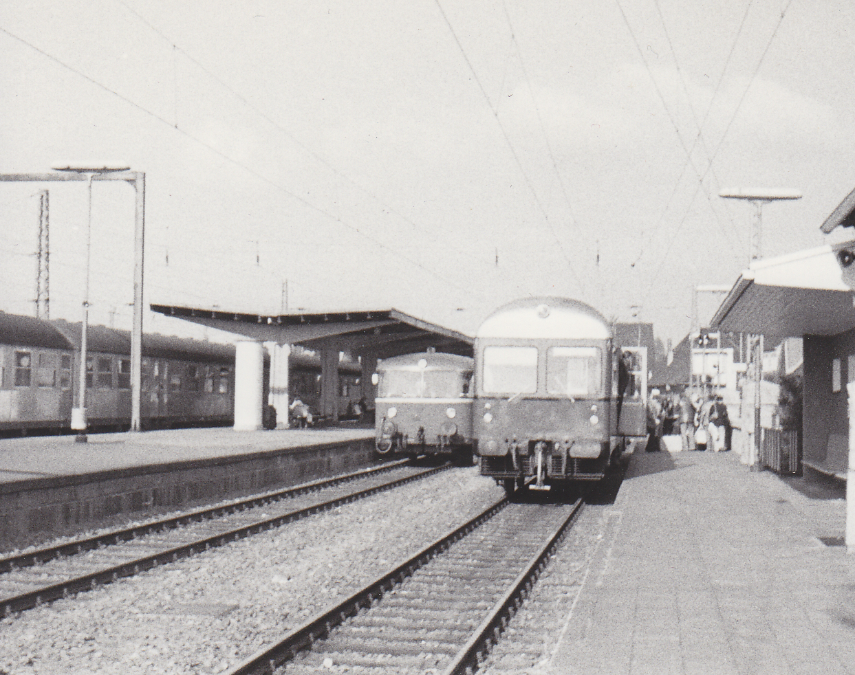 Celle Hbf am 12.10.1975. In der Mitte VT nach Gifhorn, rechts OHE MaK-GDT nach Steinhorst.